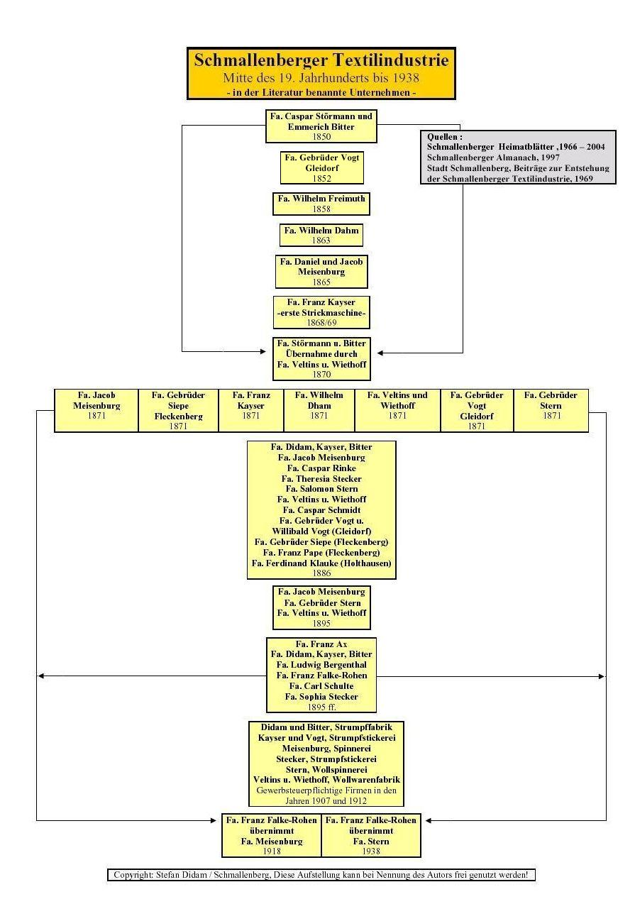 Unternehmen der Schmallenberger (NRW) Textilindustrie von 1850 bis 1938